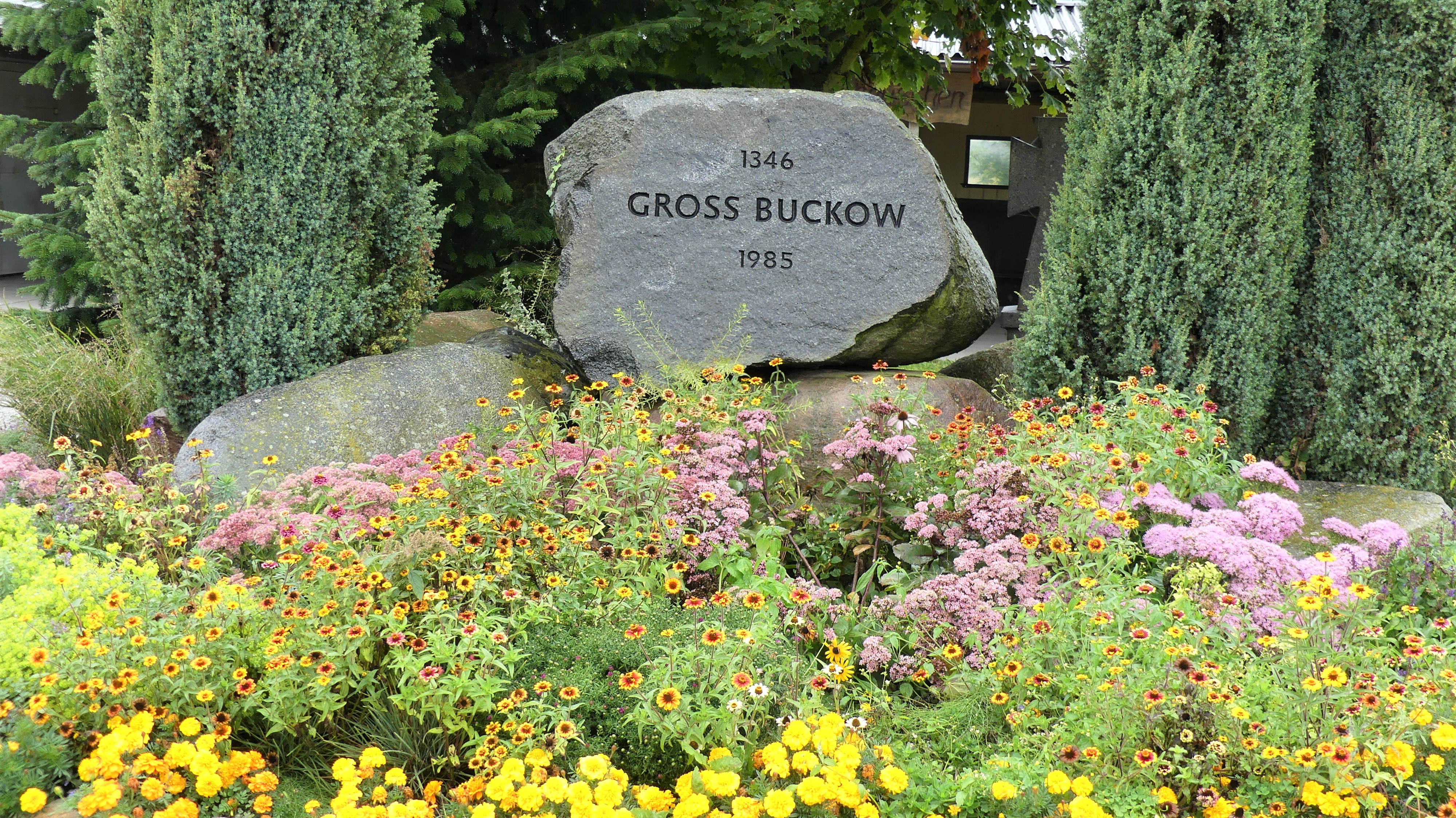 Gedenkstein an der Stelle der ehemaligen Kirche im abgebaggerten Dorf Groß Buckow. Der Standort liegt im rekultivierten Teil des Tagebaus Welzow-Süd.